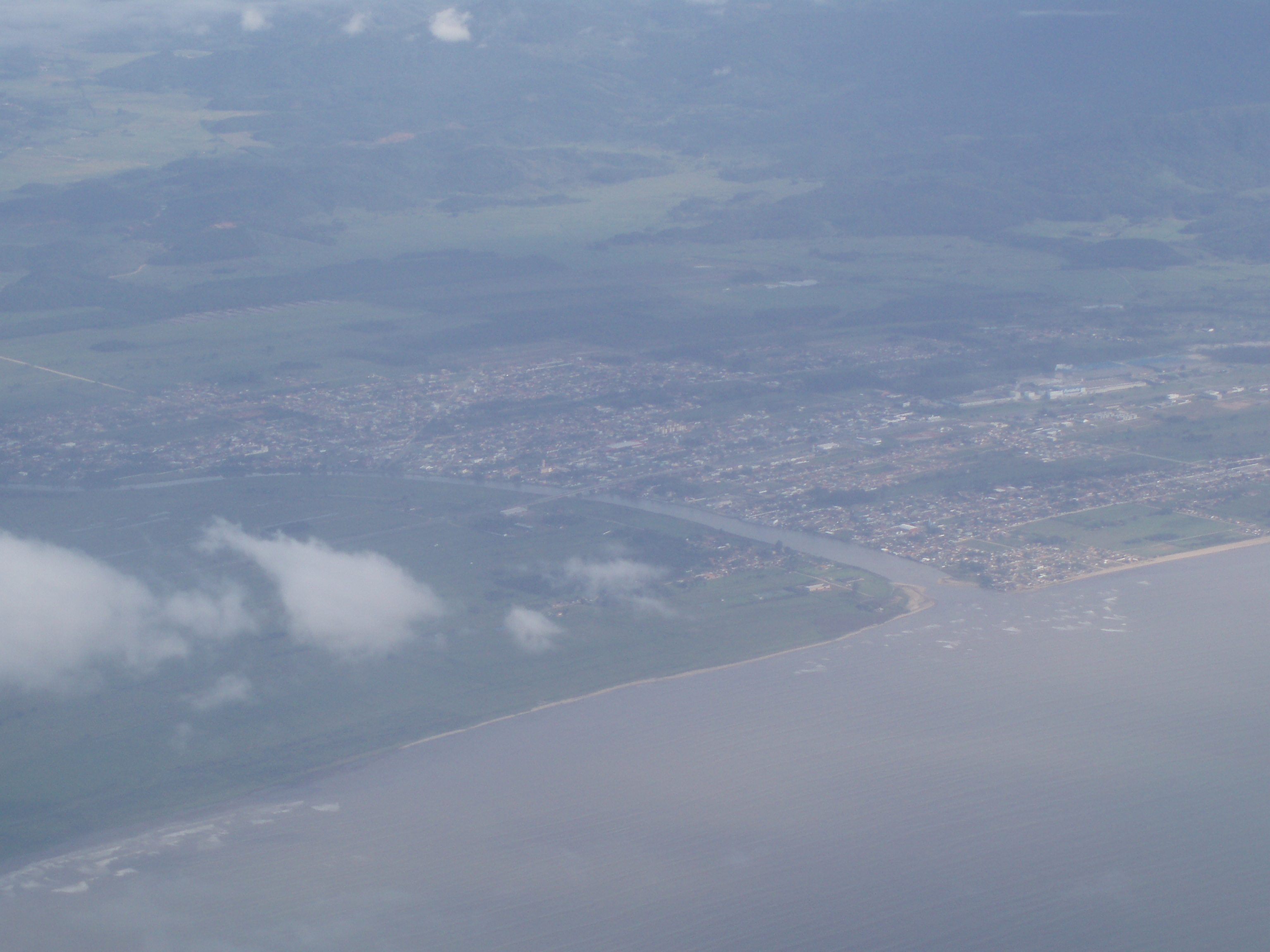 Vue d'avion de l'embouchure du rio Tijucas et du centre ville de Tijucas, Santa Catarina, Brésil